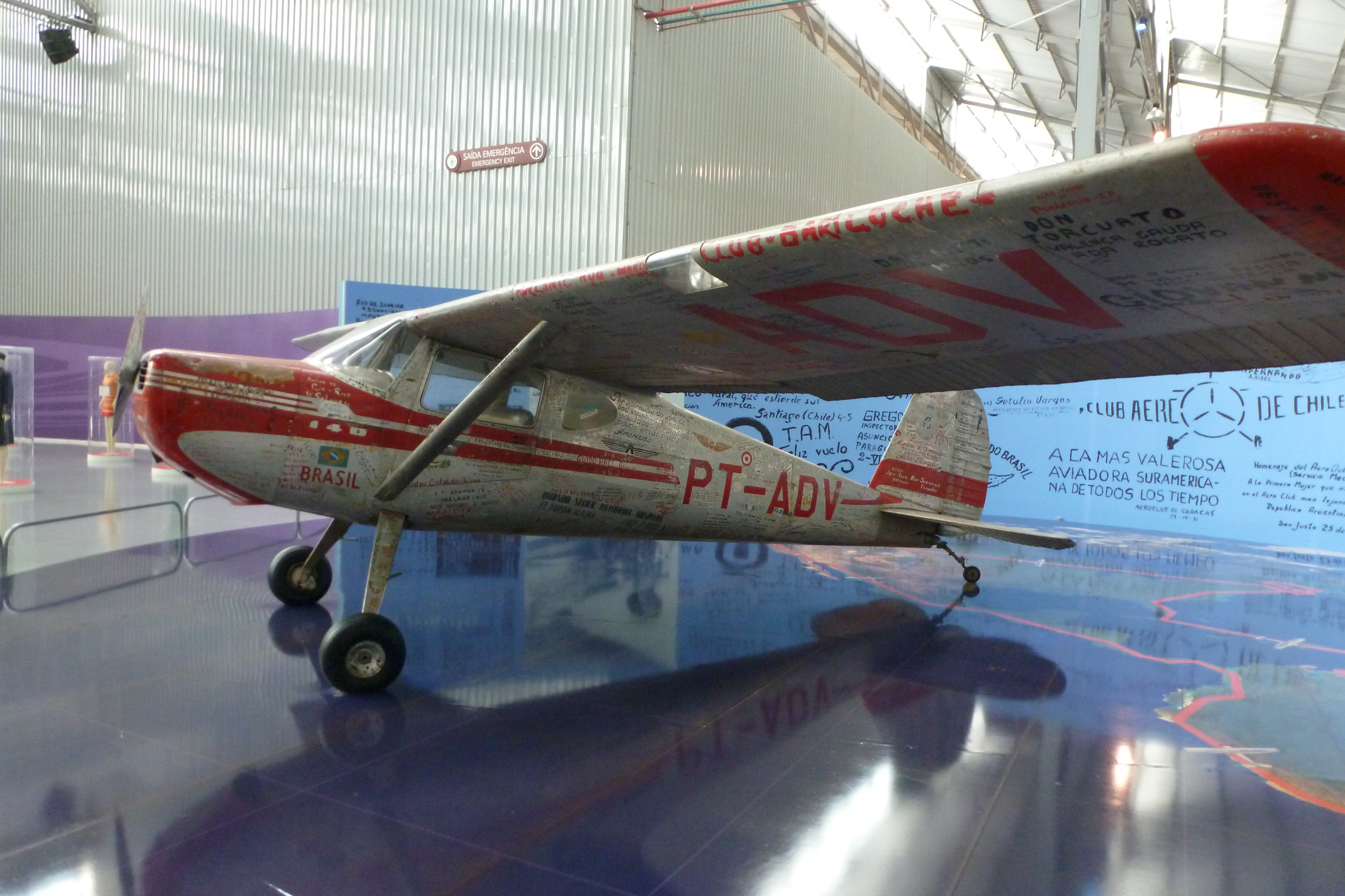 Visita ao Museu da TAM, em São Carlos, no Brasil.